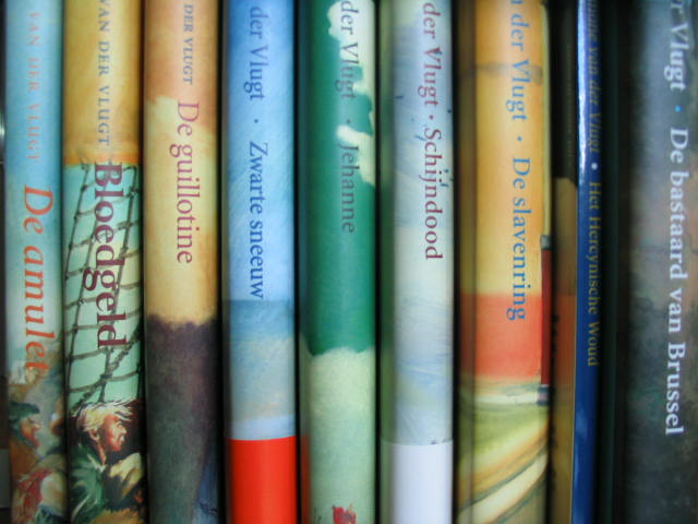 Negen boeken van Simone van der Vlugt van mijn eigen boekenplankje. Dus